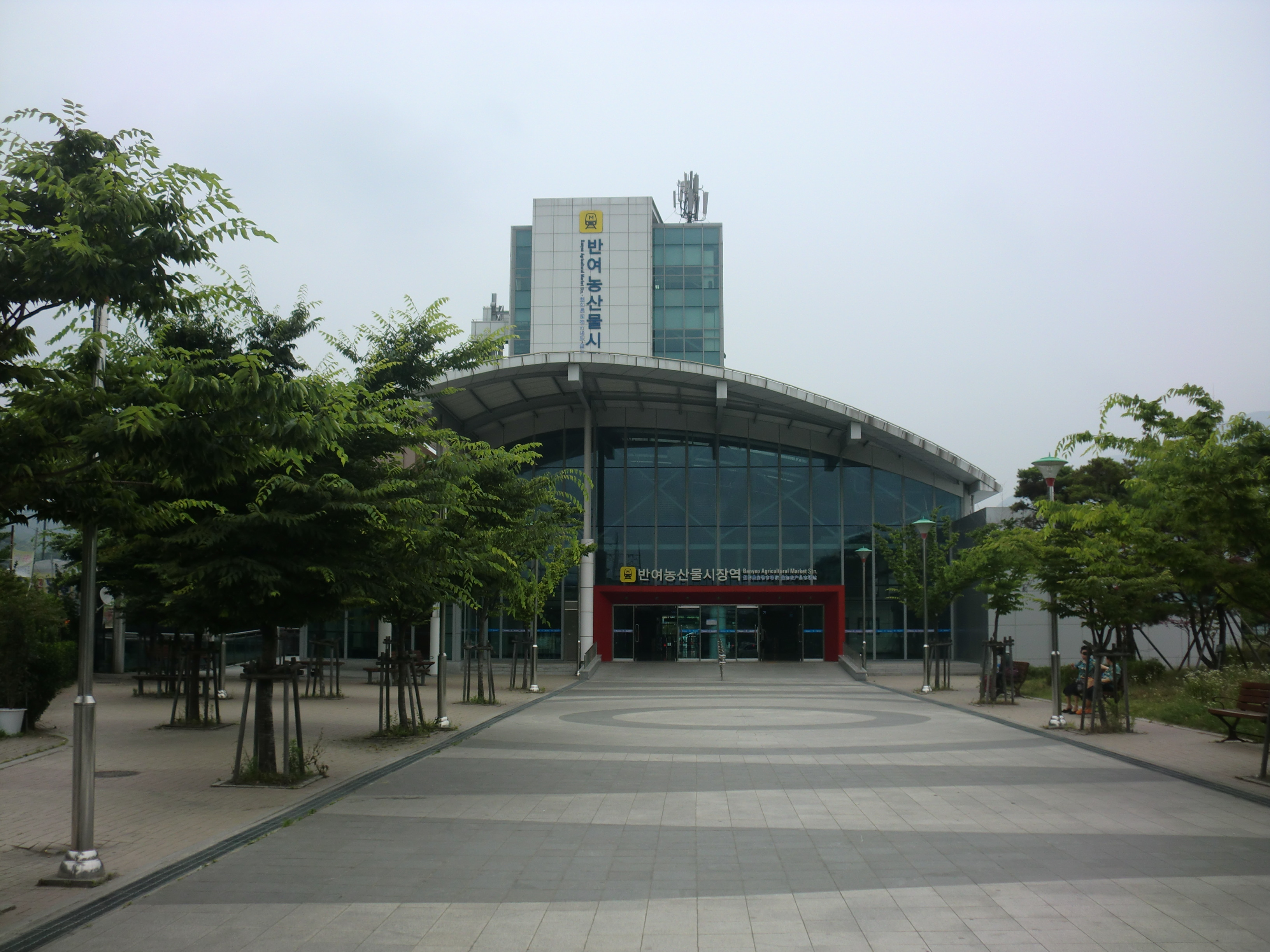 부산도시철도4호선 반여농산물시장역